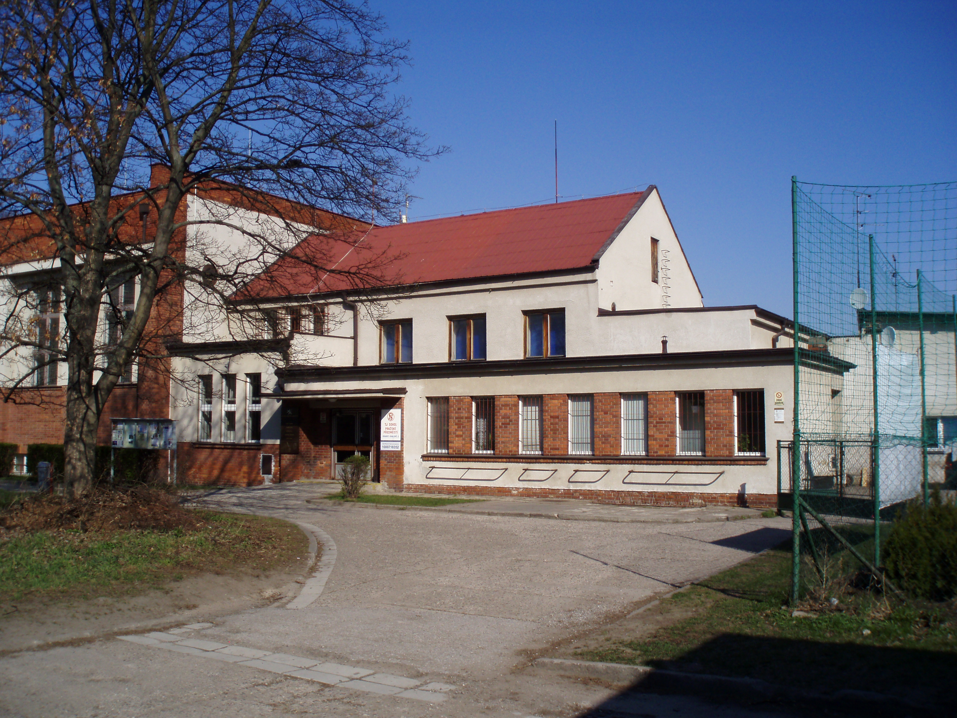 Sokolovna na Pražském Předměstí, Chelčického 201/3, Hradec Králové-Pražské Předměstí.